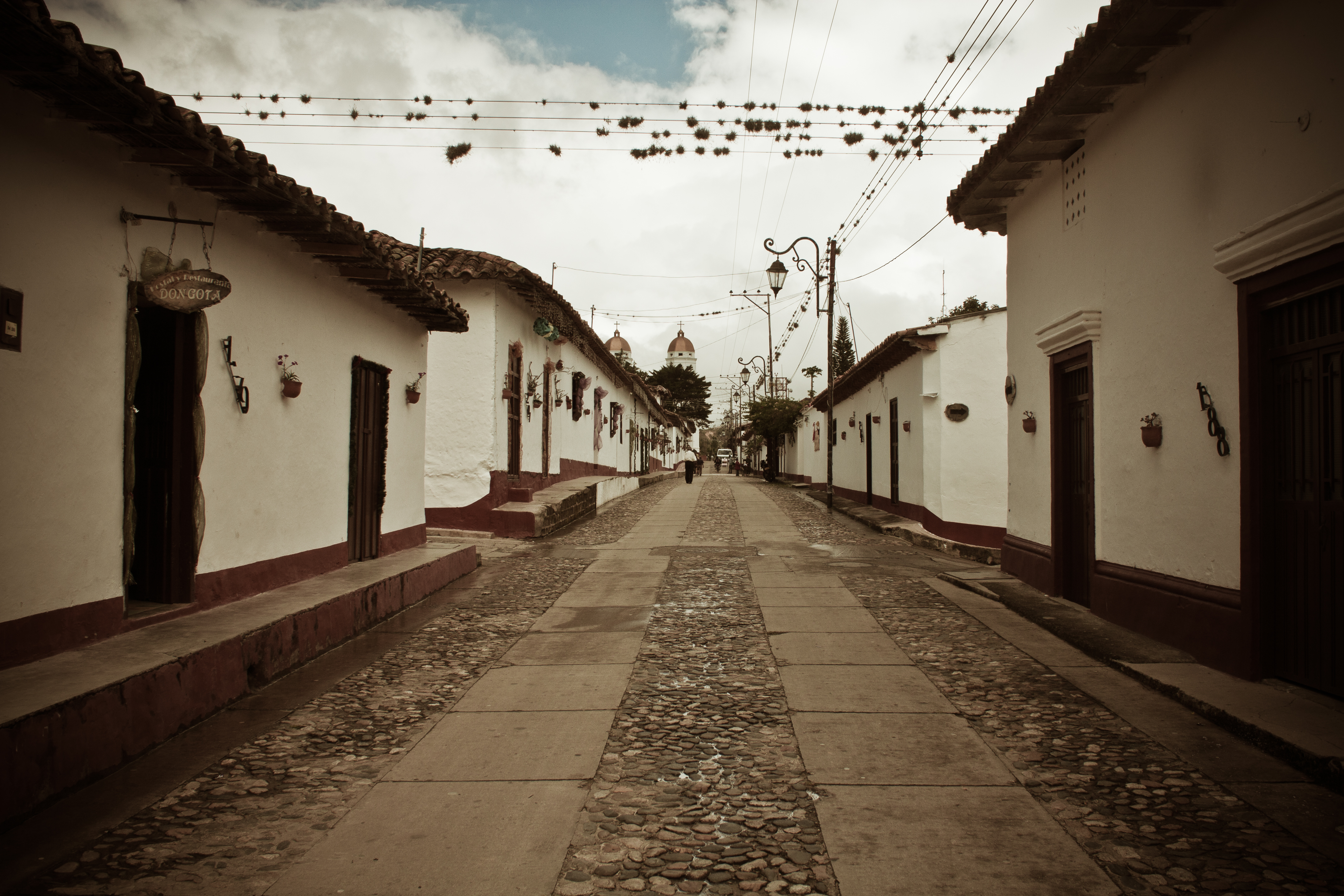 Centro Histórico de La Playa de Belén